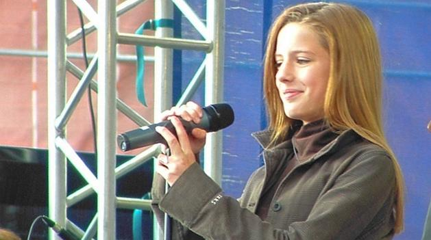 Margot De Ridder tijdens Flikkendag 2004 op 26 september 2004 in Gent (België).